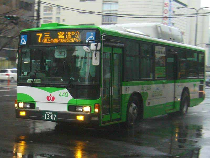 登録番号：神戸200か13-07 神戸市営バス(Kobe City Bus)所属 car no.449 三菱ふそう・エアロスター PJ-MP37JM